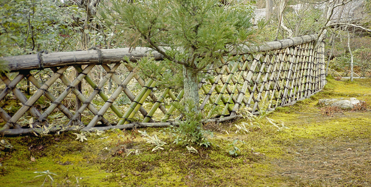 Kōetsu-ji, Kyoto, Japan 光悦寺